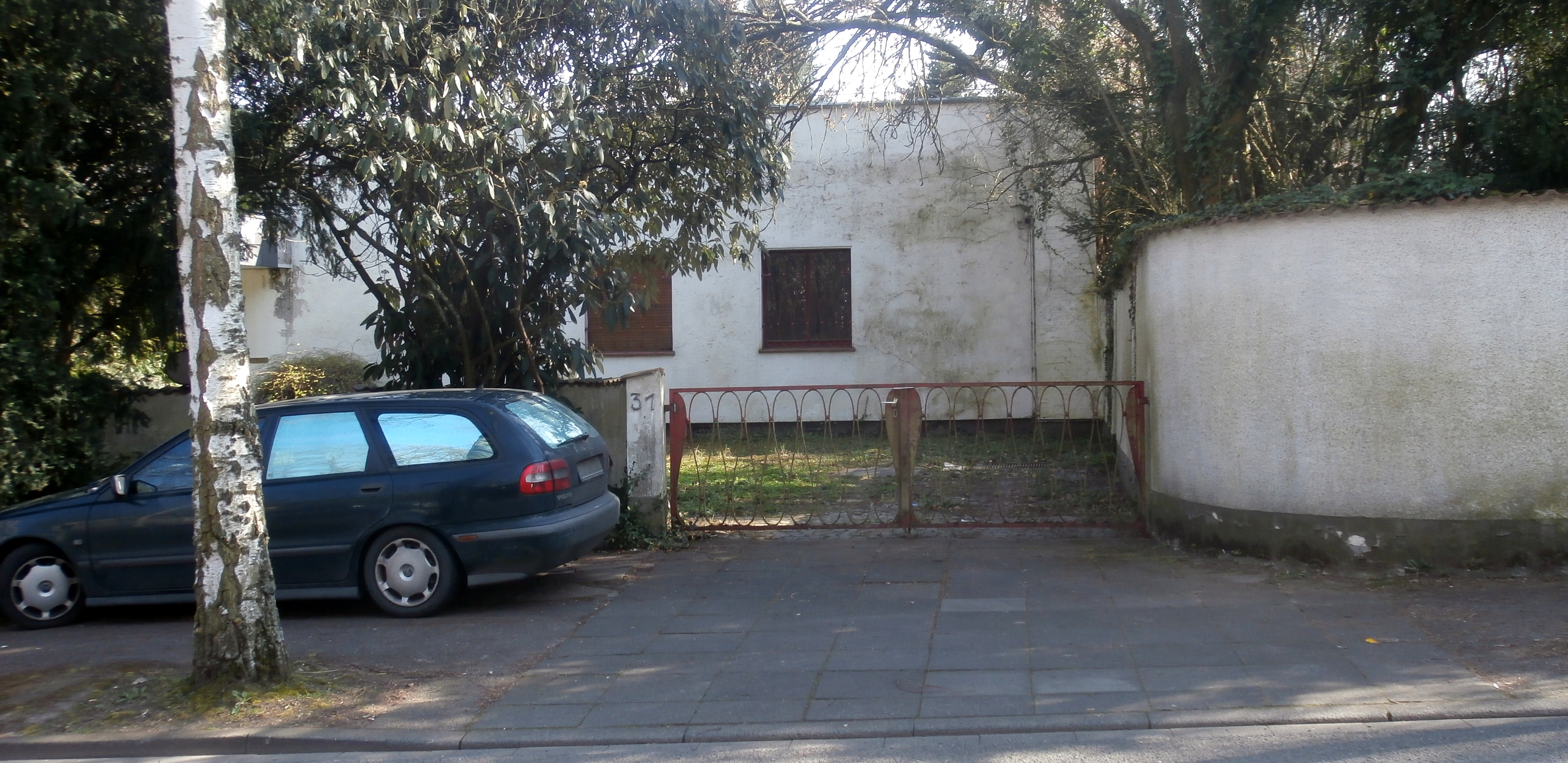 Ehemalige Residenz der Botschaft der Russischen Föderation, Venner Straße 31, Schweinheim, Bad Godesberg: Eingang